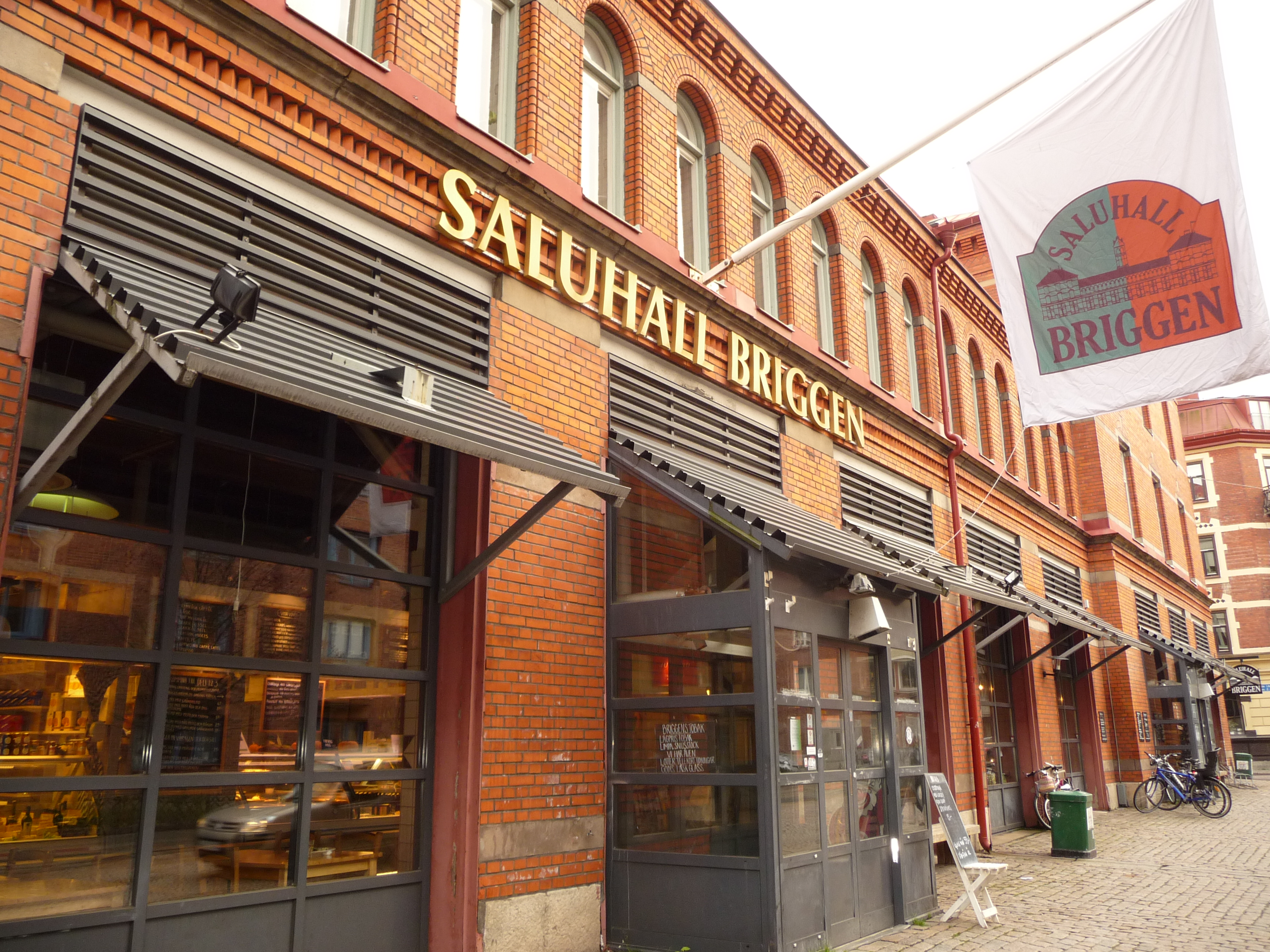 Saluhallen Briggen vid Nordhemsgatan 28, Masthugget, Göteborg.